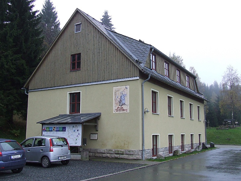 Zechenhaus der Zinnerzgrube Tannenberg